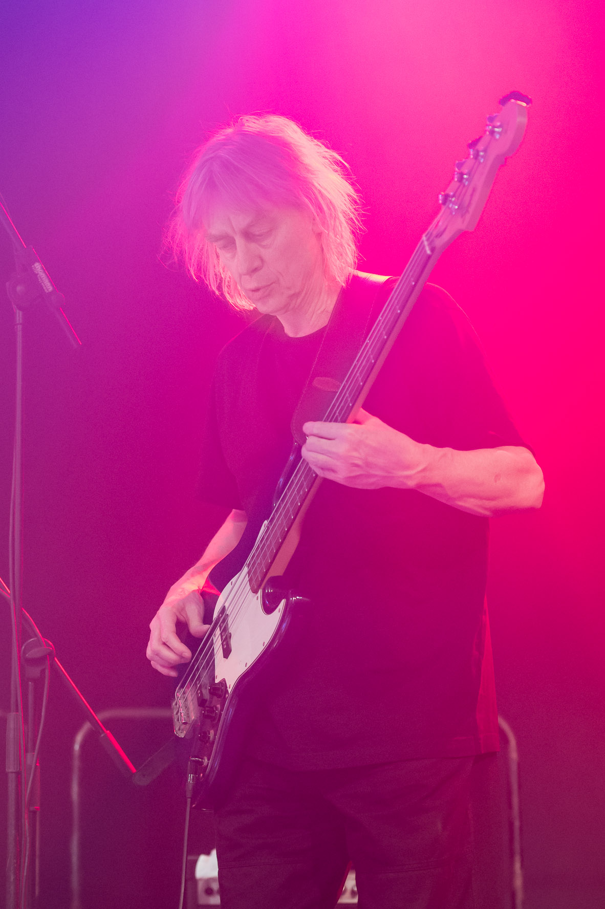 Ton Steine Scherben - Ding Ding Dang Dang-Tour 2014 im Hirsch in Nürnberg am 08.04.2014 Der Hirsch,Ding Ding Dang Dang,Kai Sichtermann,Konzert,Livekonzert,Livemusik,Ton Steine Scherben,Tour2014